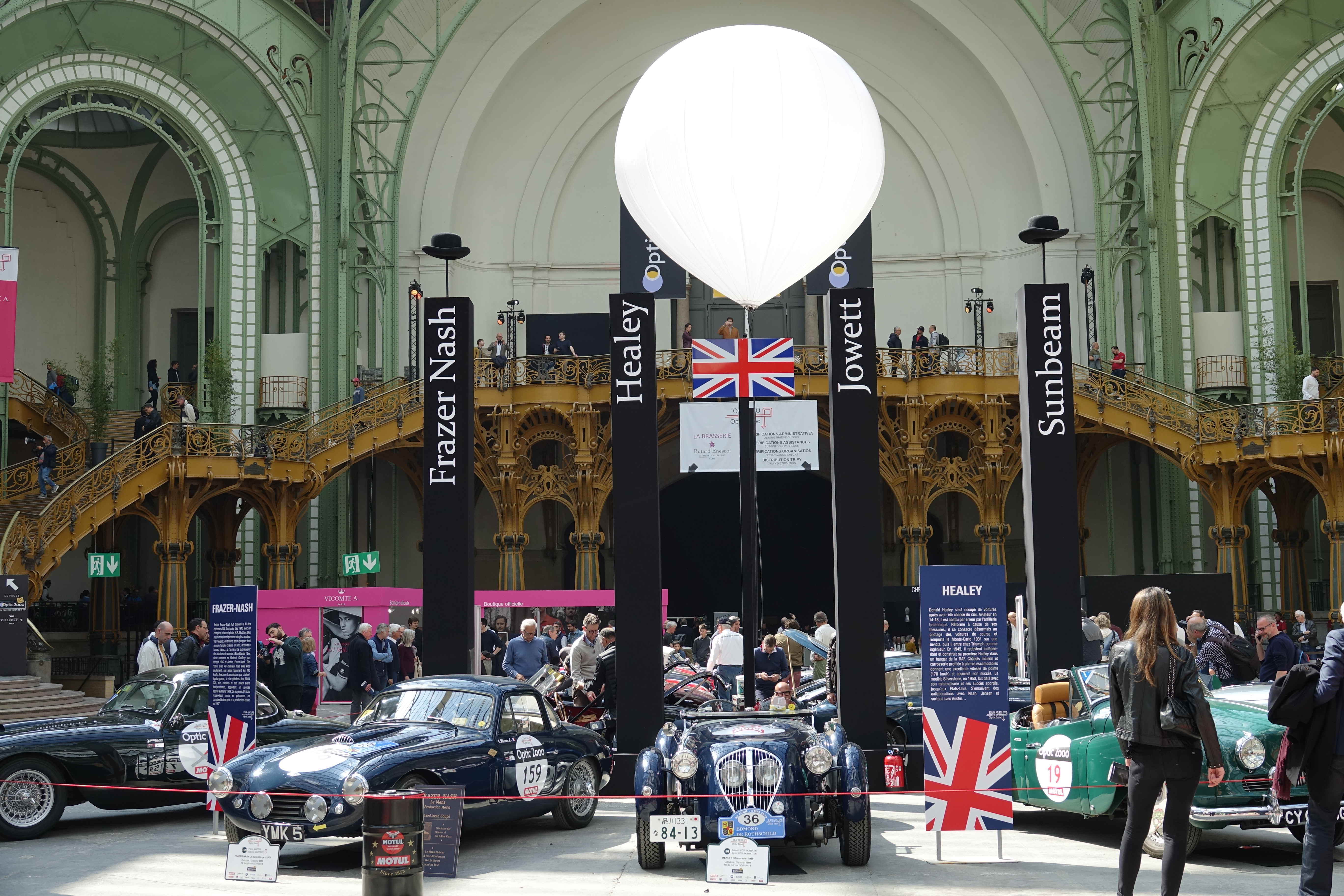 Tour Auto 2019